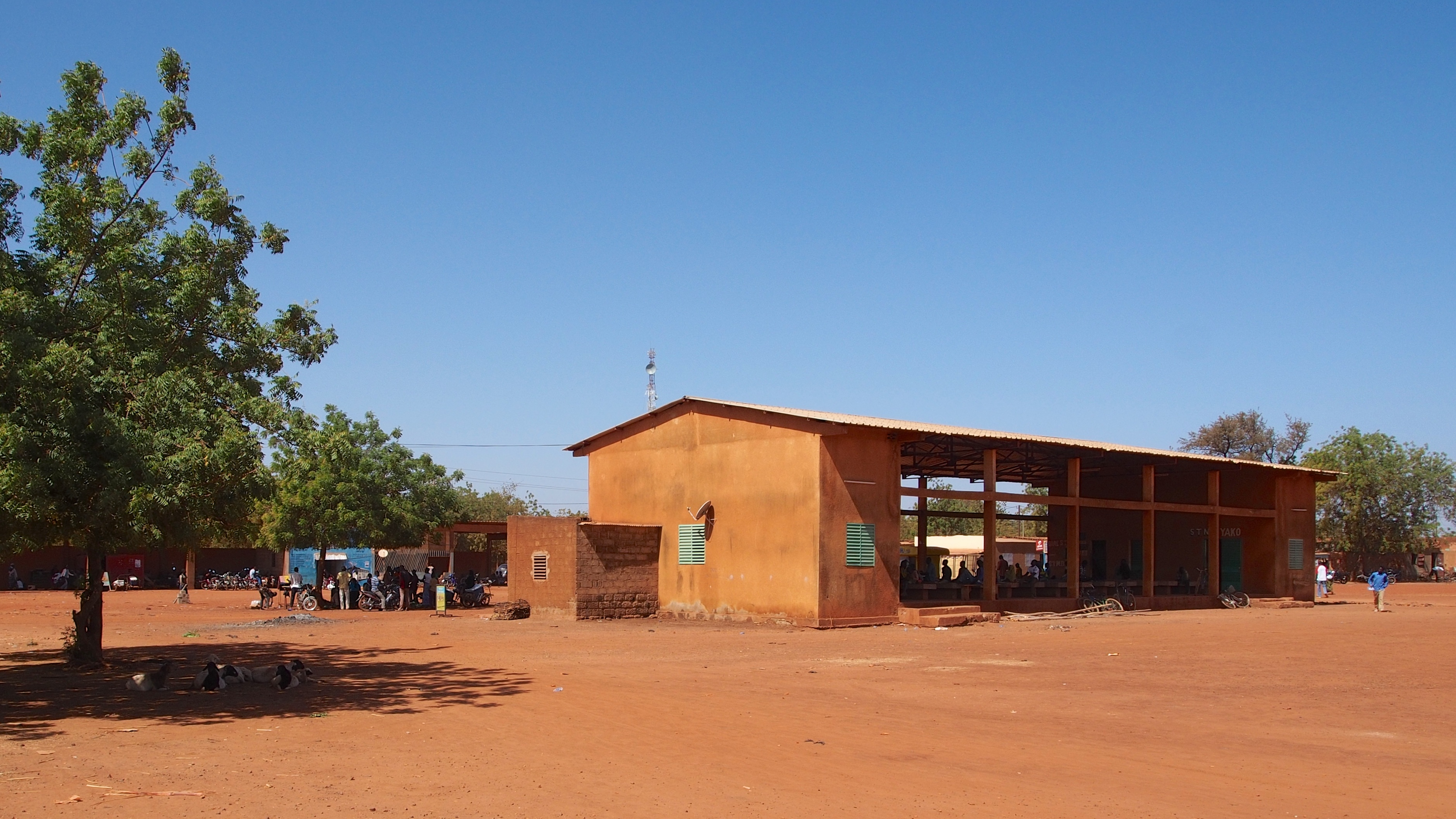 Gare routière de Yako, chef-lieu de la province du Passoré, Burkina Faso